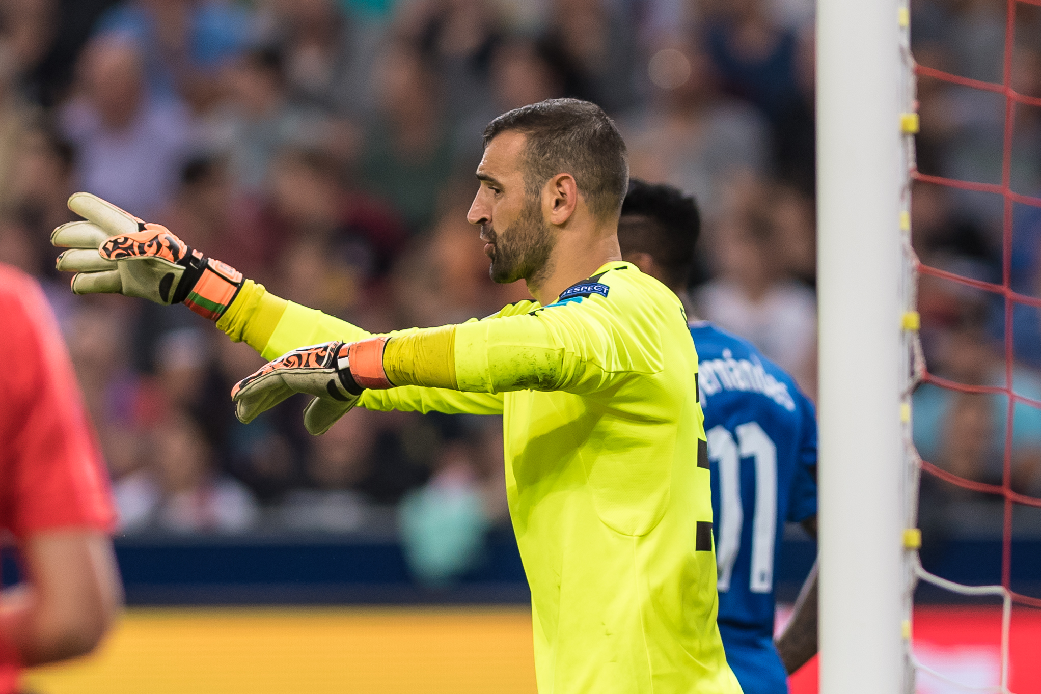 UEFA Champions League - Play-Offs - FC Salzburg vs Dinamo Zagreb. Bild zeigt Eduardo (Dinamo Zagreb).